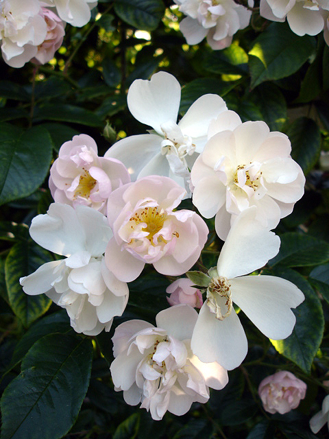 Rosa Filipes-group 'Brenda Colvin'